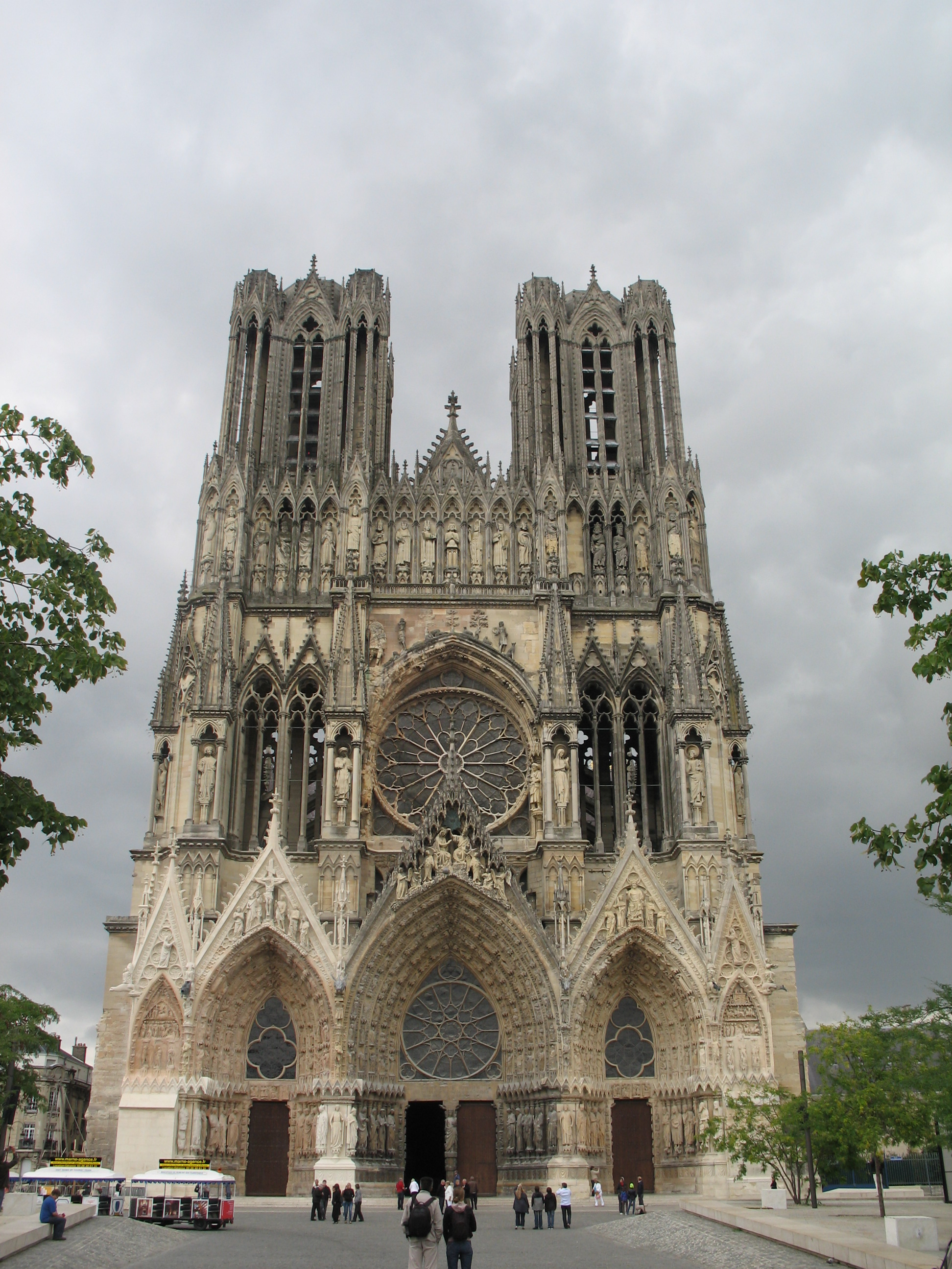 Cathédrale Notre-Dame, ancienne abbaye Saint-Rémi et palais de Tau, Reims